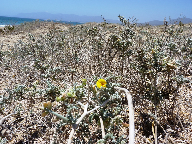 Localidad: Guanaqueros, región de Coquimbo.